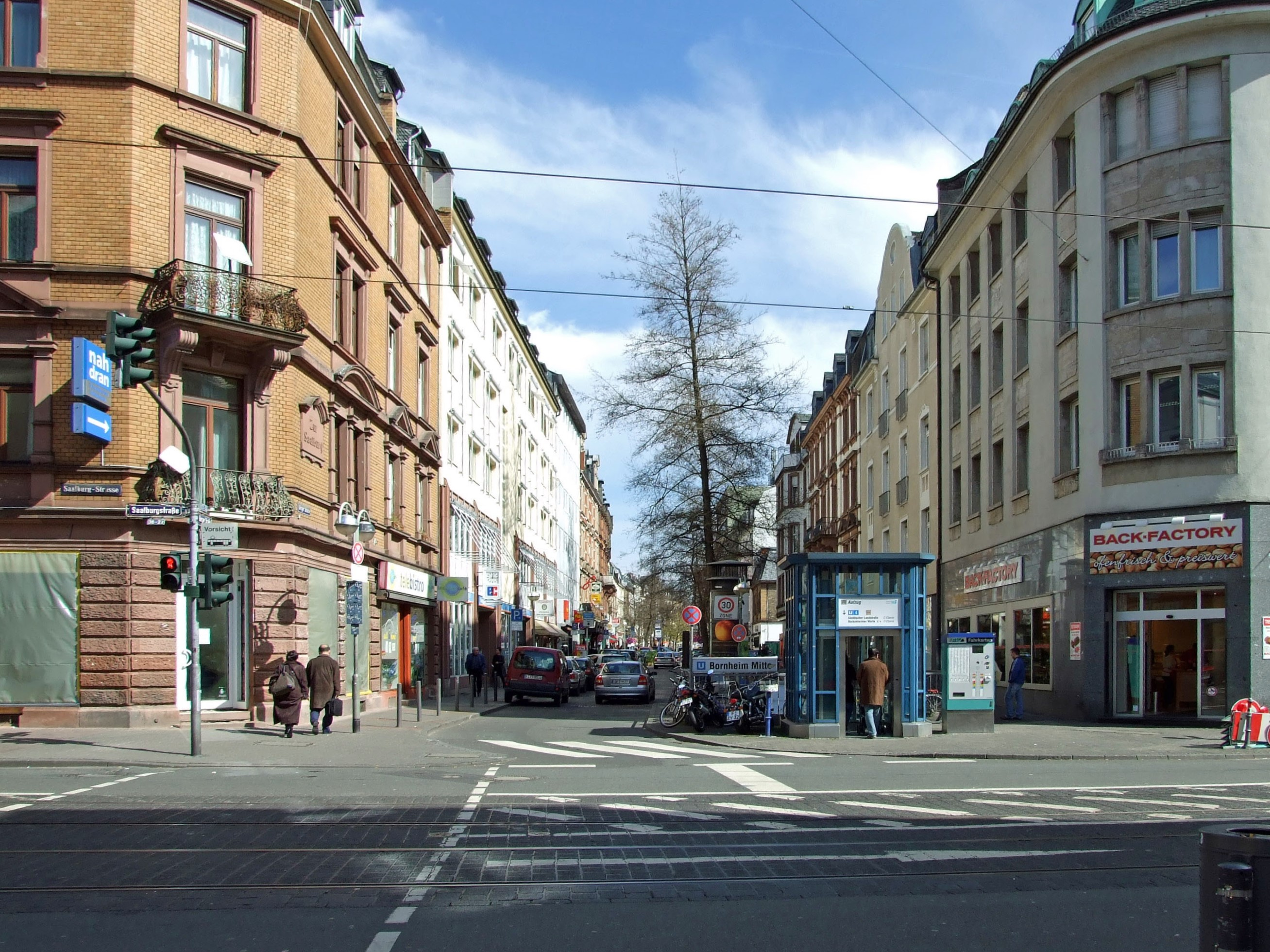 Berger Strasse an der Saalburgstrasse (Station Bornheim-Mitte)in Richtung „Bornheimer Foenffingerplaetzchen“, Ffm-Bornheim